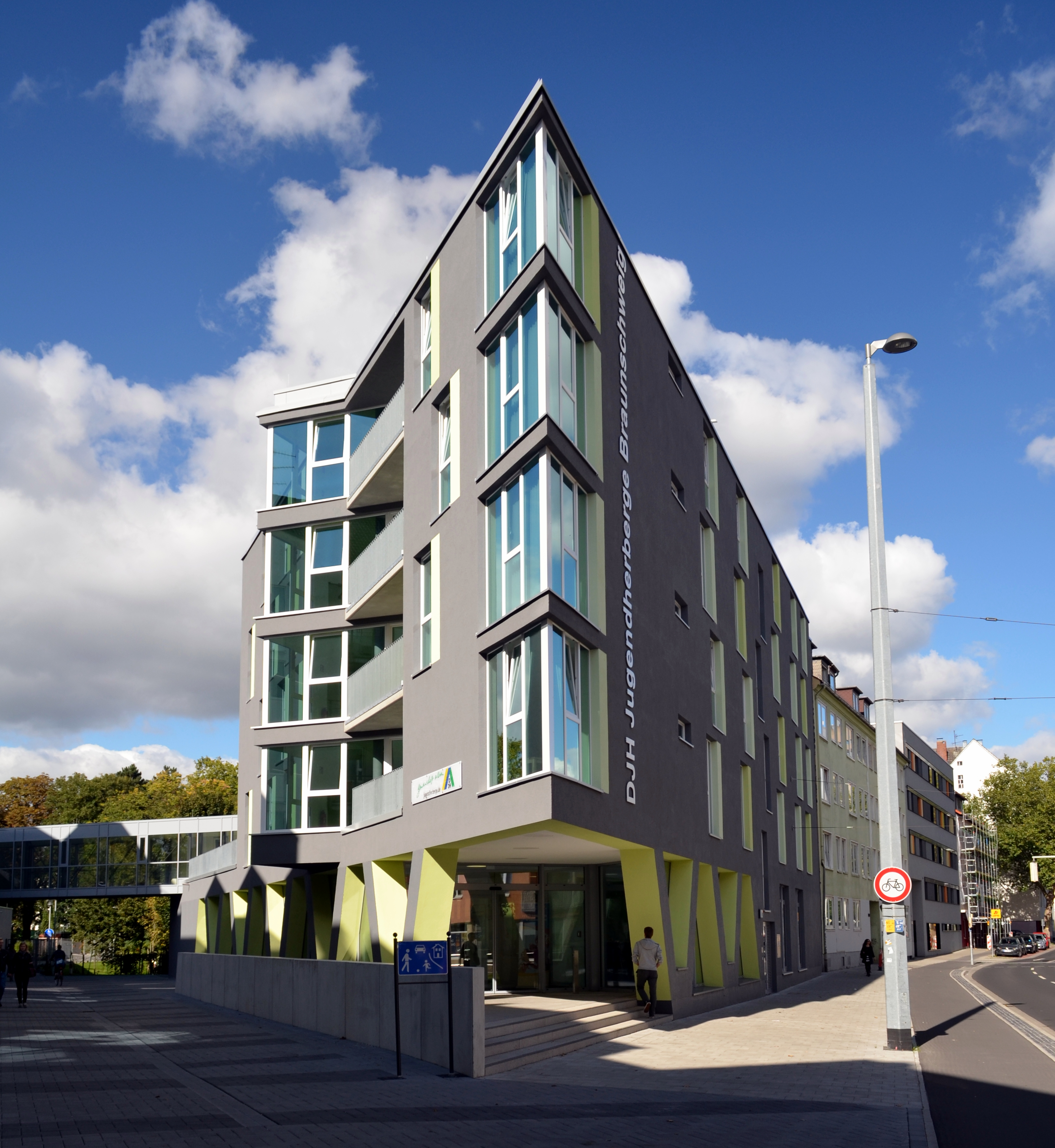 Braunschweig: Neue Jugendherberge Braunschweig, Wendenstraße 30, 38100 Braunschweig. [1]